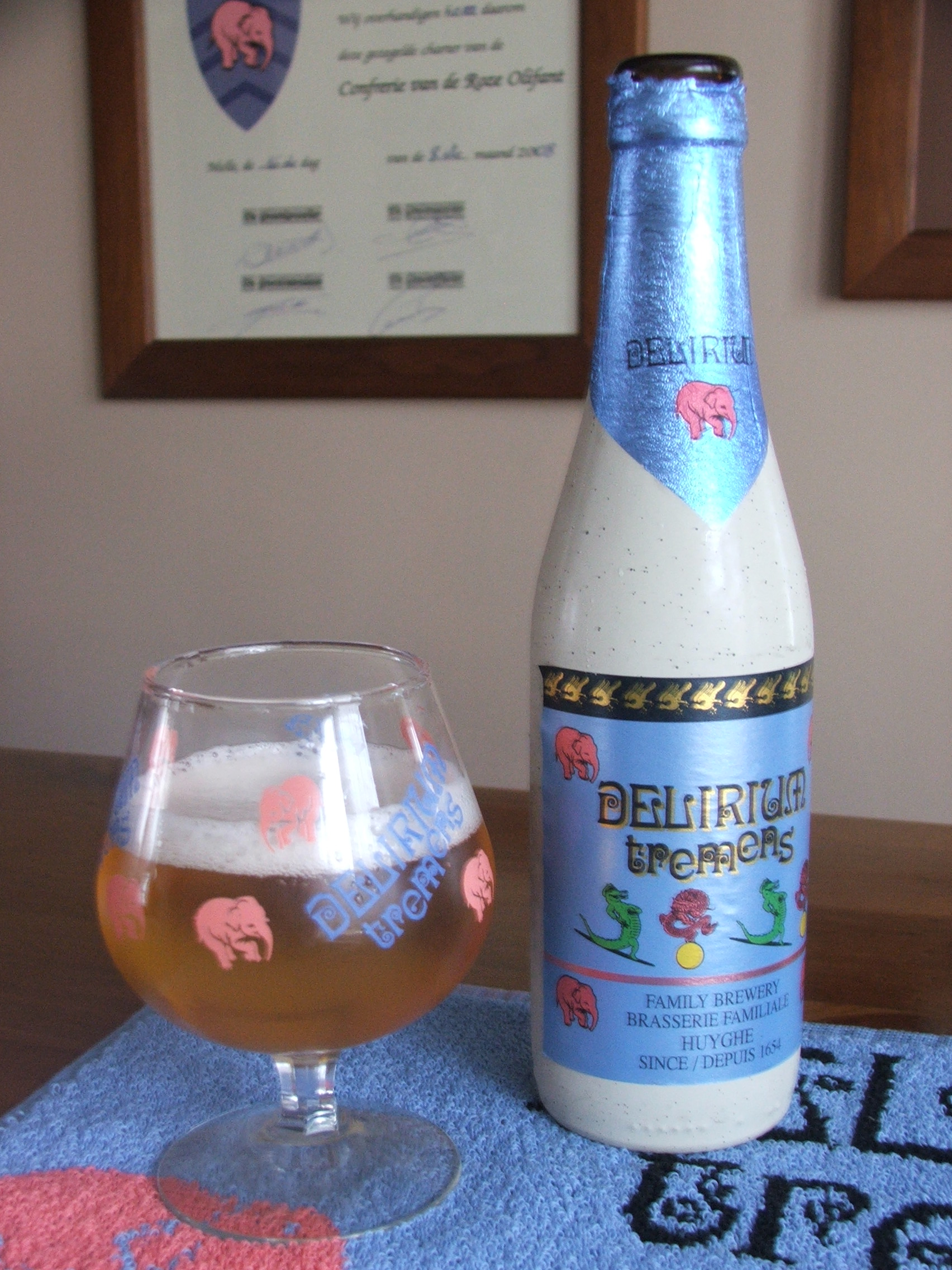 bouteille de bière Délirium tremens avec verre sur mon bar